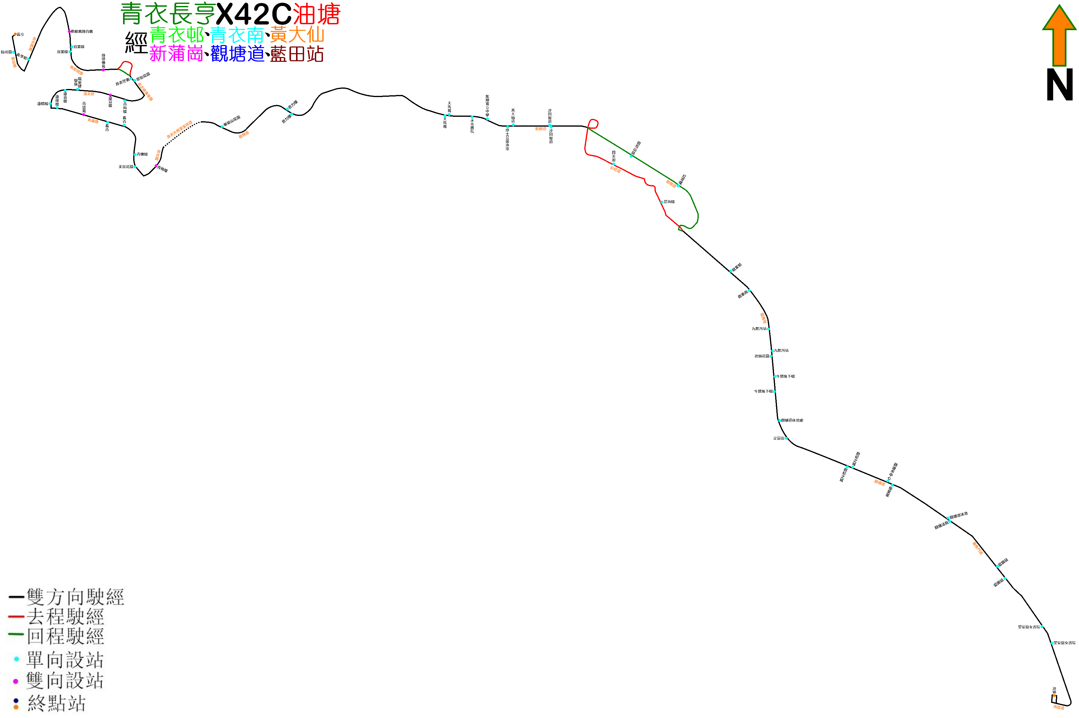 中文（香港）: 九巴X42C線的走線圖